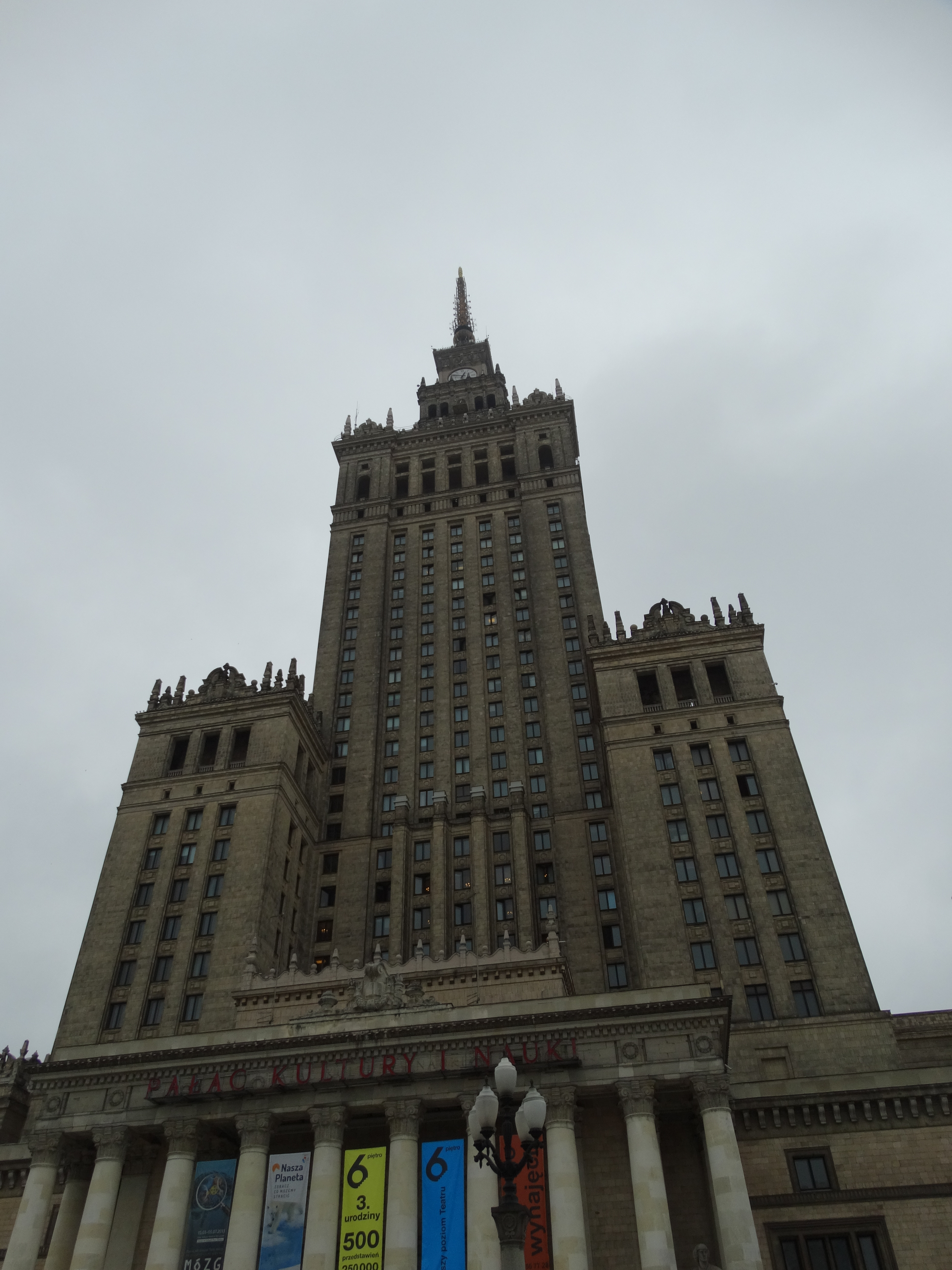 Palace of Culture and Science. Warsaw. Mazovia province. Poland. Дворец Культуры и Науки. Варшава. Мазовецкое воеводство. Польша